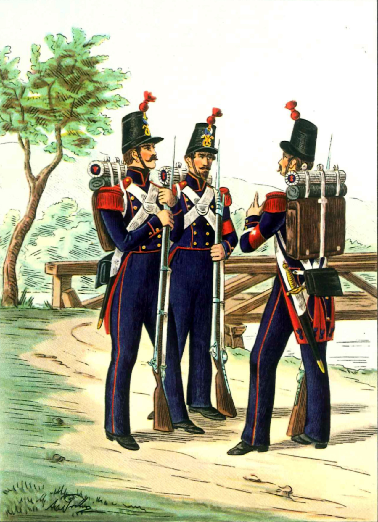 Sappeure der Truppen des Kantons Zürich um 1845